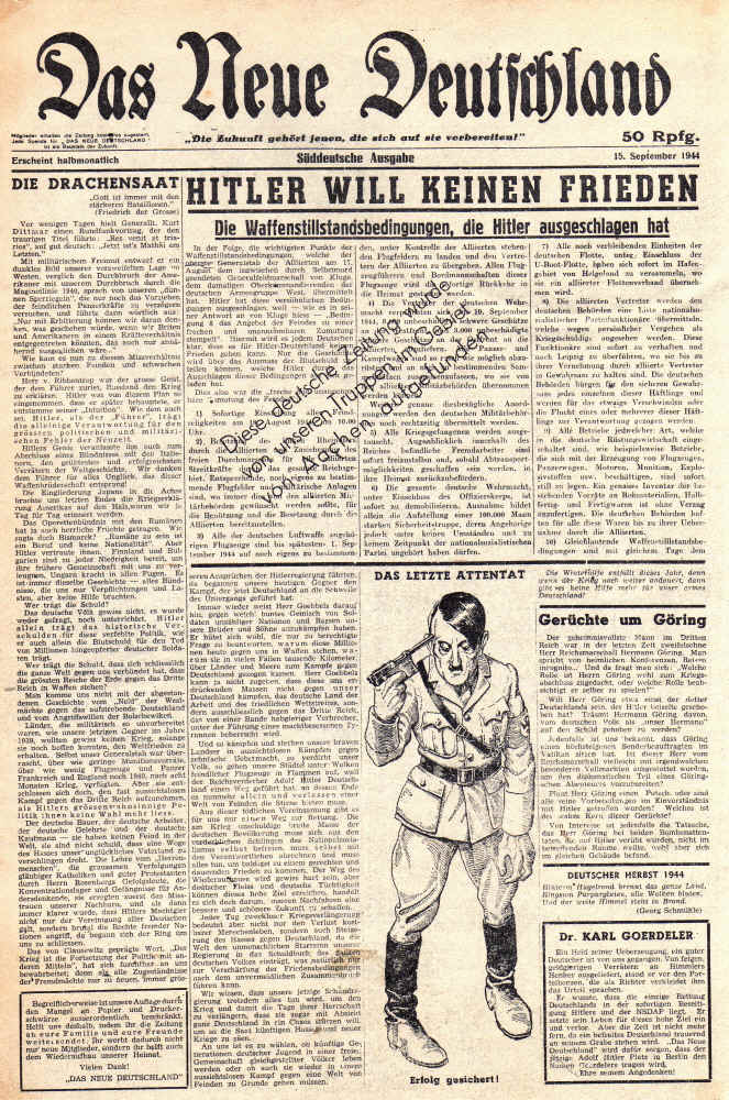 Von der OSS gefälschte Deutsche Zeitung.